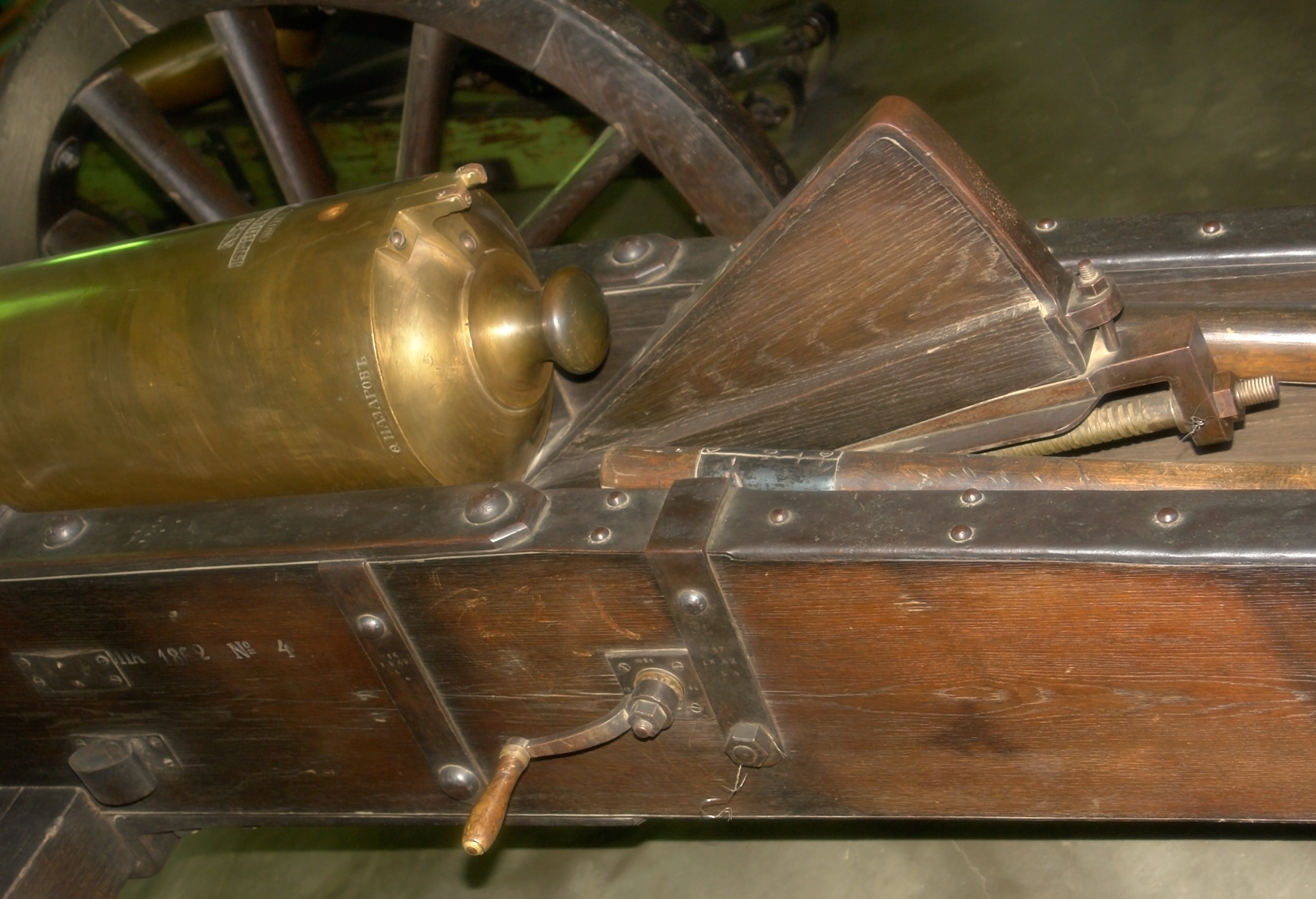 1/2 пудовый (152-мм) полевой единорог образца 1838 года. Фрагмент. Бронза, длина 174 см. Масса 707 кг, отлит в 1849 в Брянском арсенале мастером Назаровым. Дальность 1278 м. Военно-исторический музей артиллерии, инженерных войск и войск связи, Санкт-Петербург.